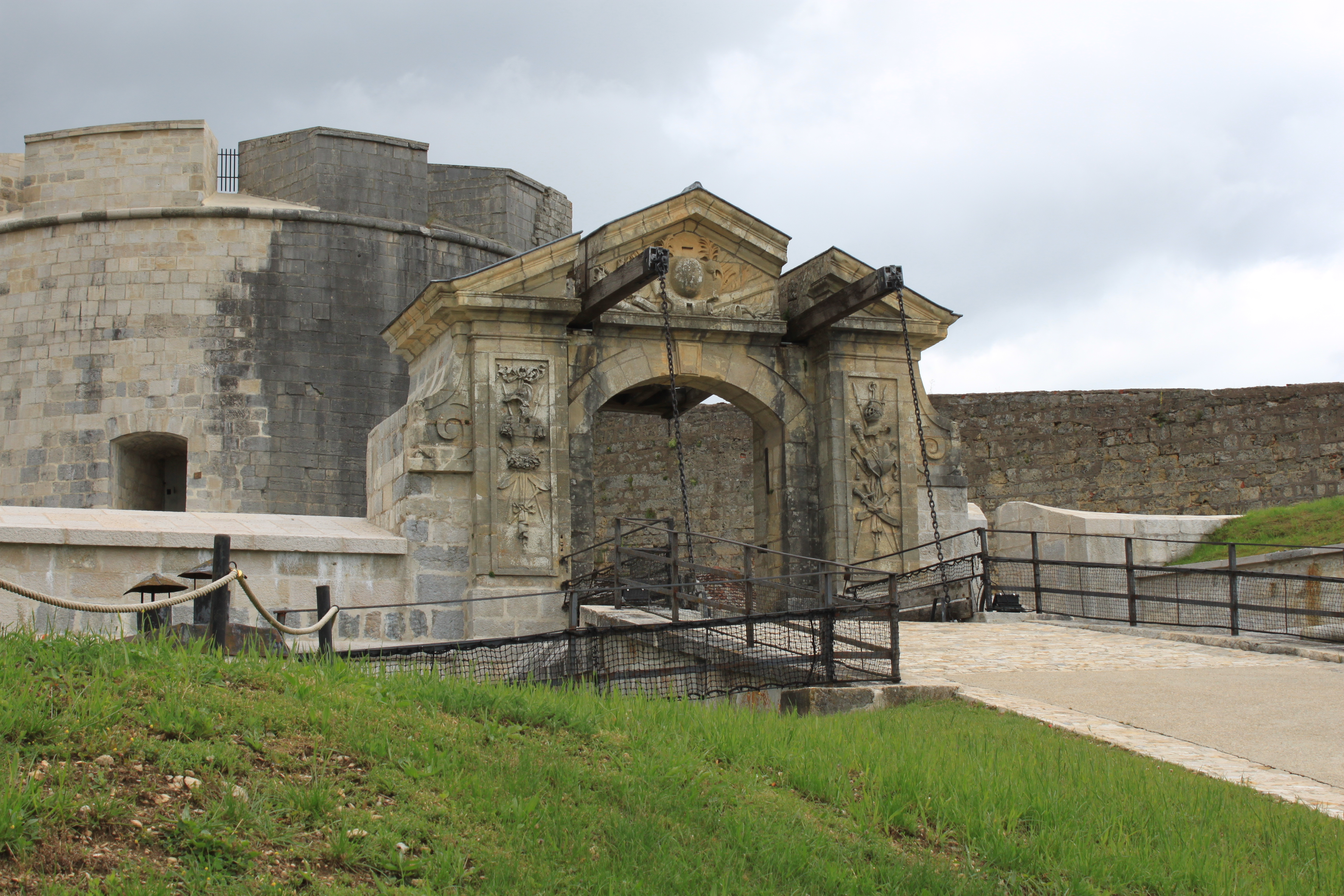 Fort de Joux, Doubs, Franche-Comté, France